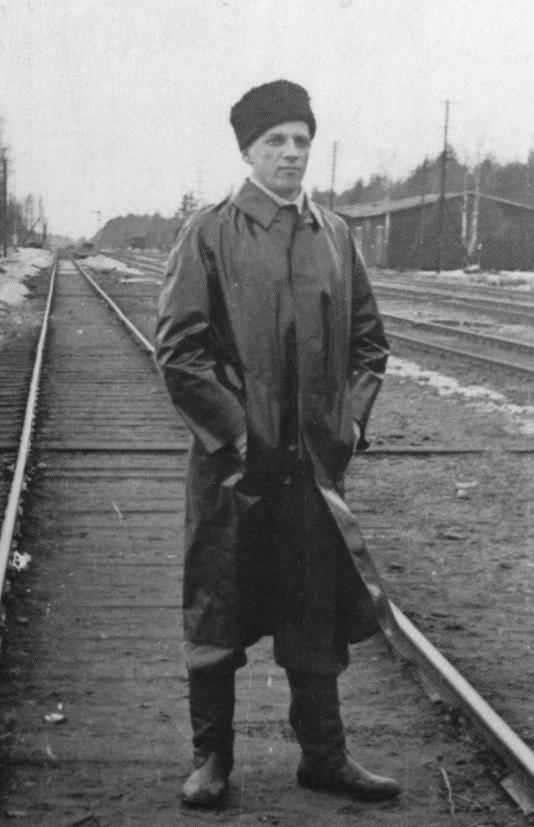 Suomalainen näyttelijä Leo Lastumäki (1927–2012) Oulun Tuiran asemalla vuonna 1945.